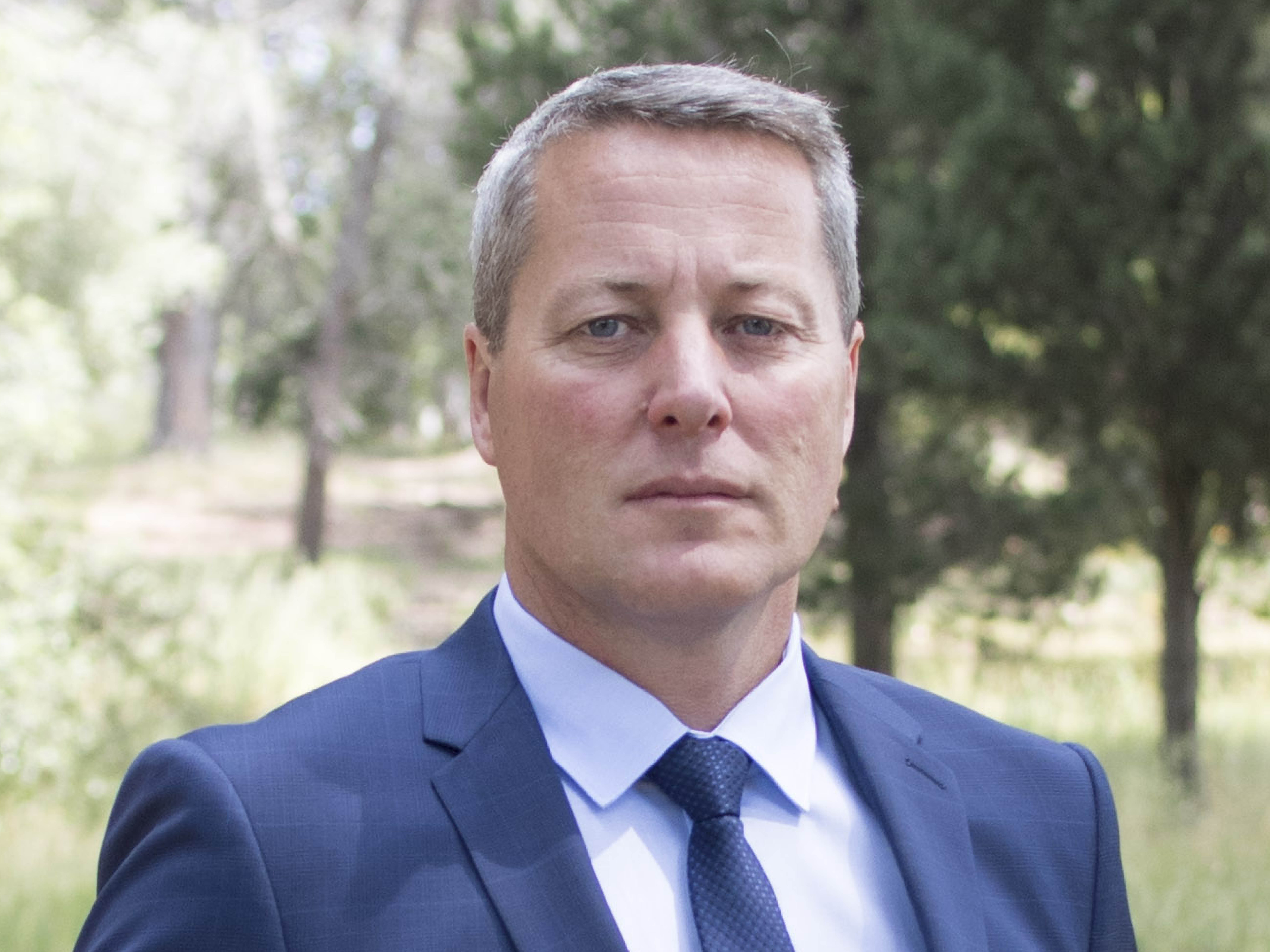 Portrait de Philippe Michel-Kleisbauer